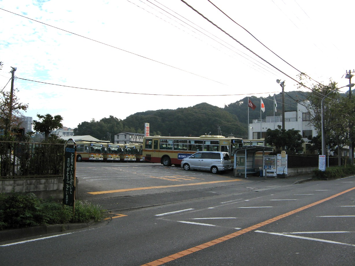 神奈川中央交通横浜営業所